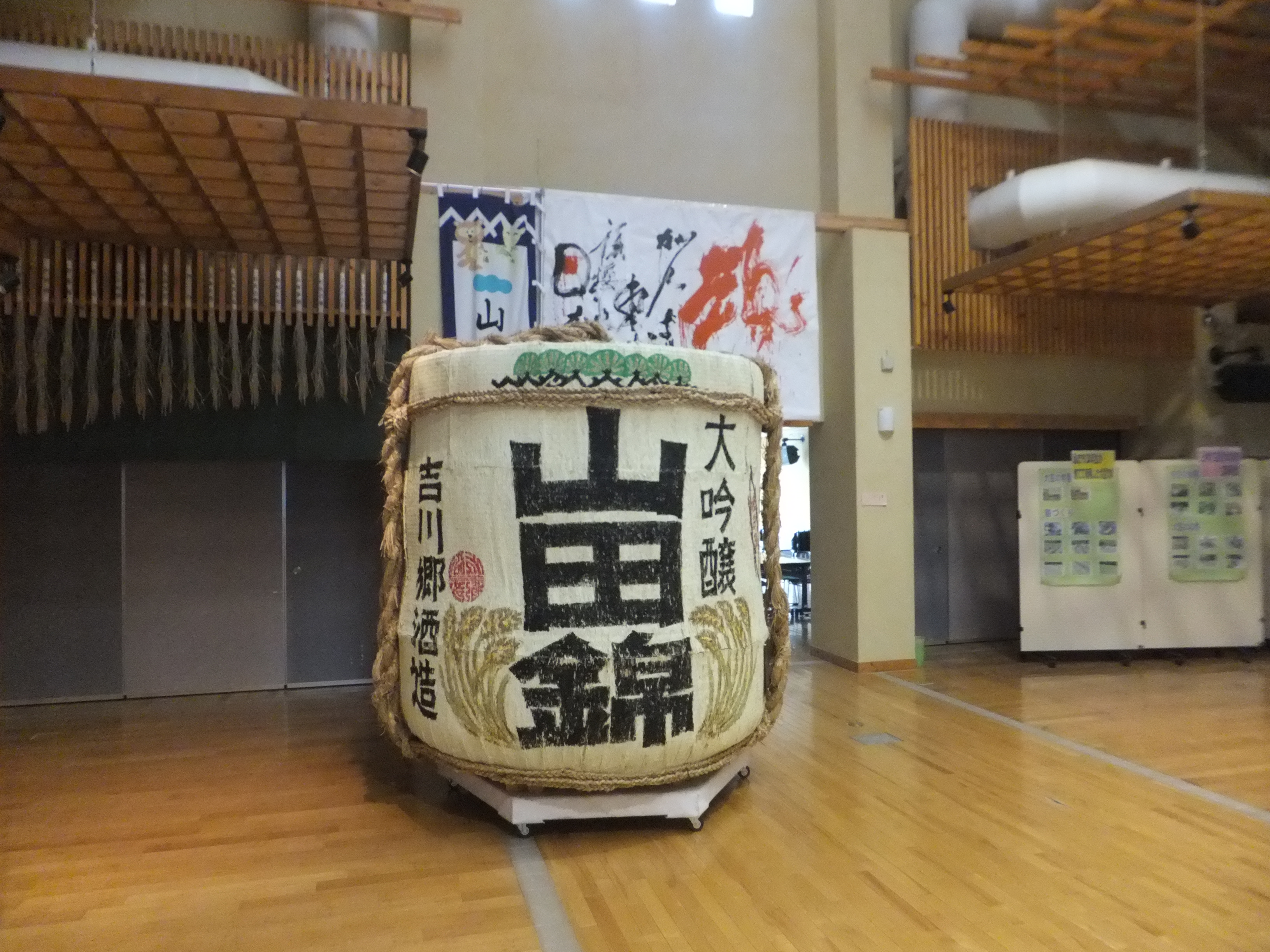 山田錦の郷